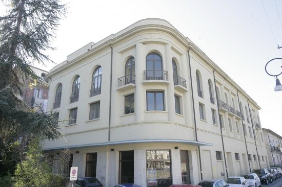 Facciata esterna del Teatro Morelli a Cosenza